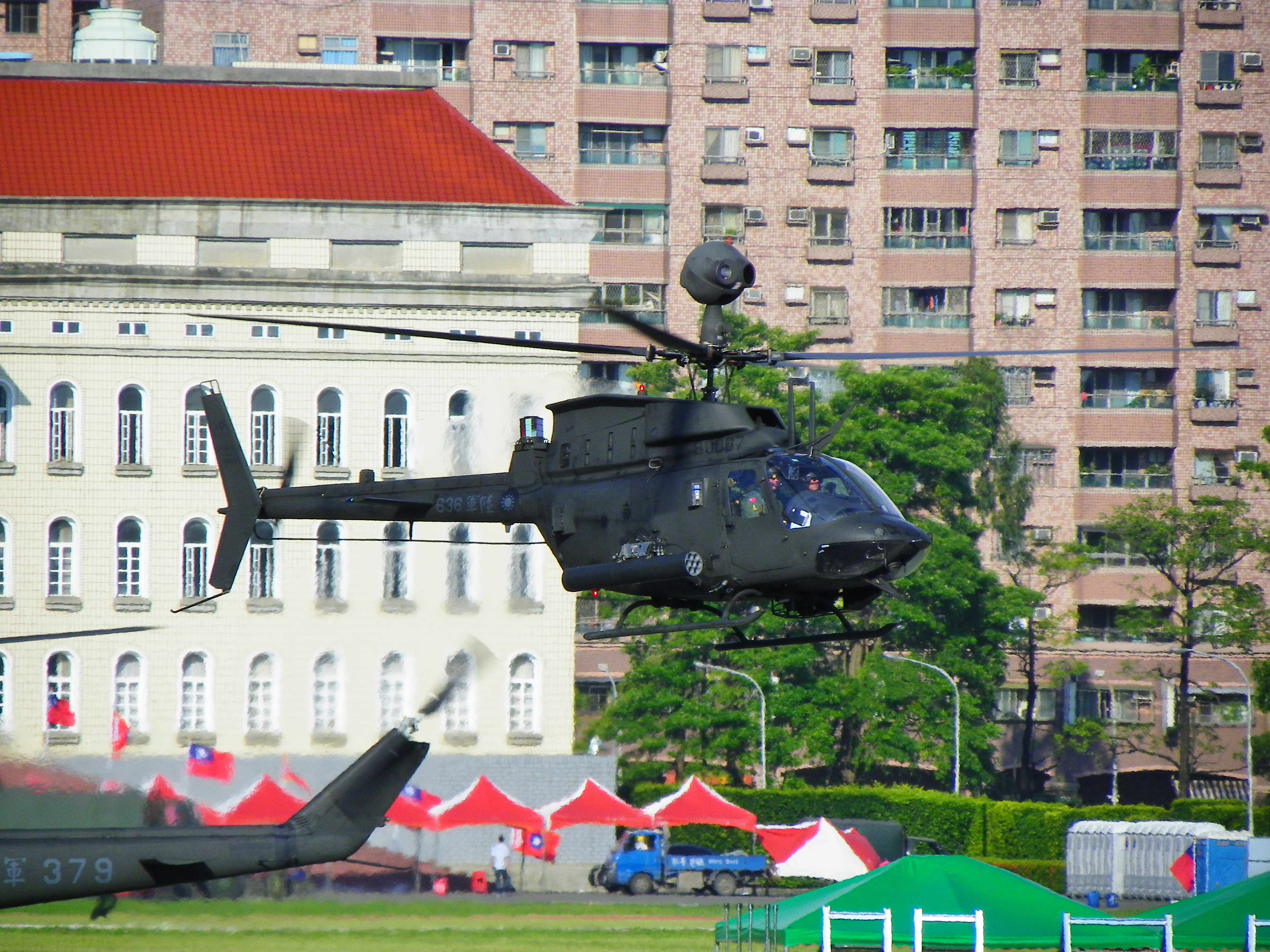 2014年陸軍官校營區開放活動尾聲，陸航OH-58D 636從操場起飛返回駐地。